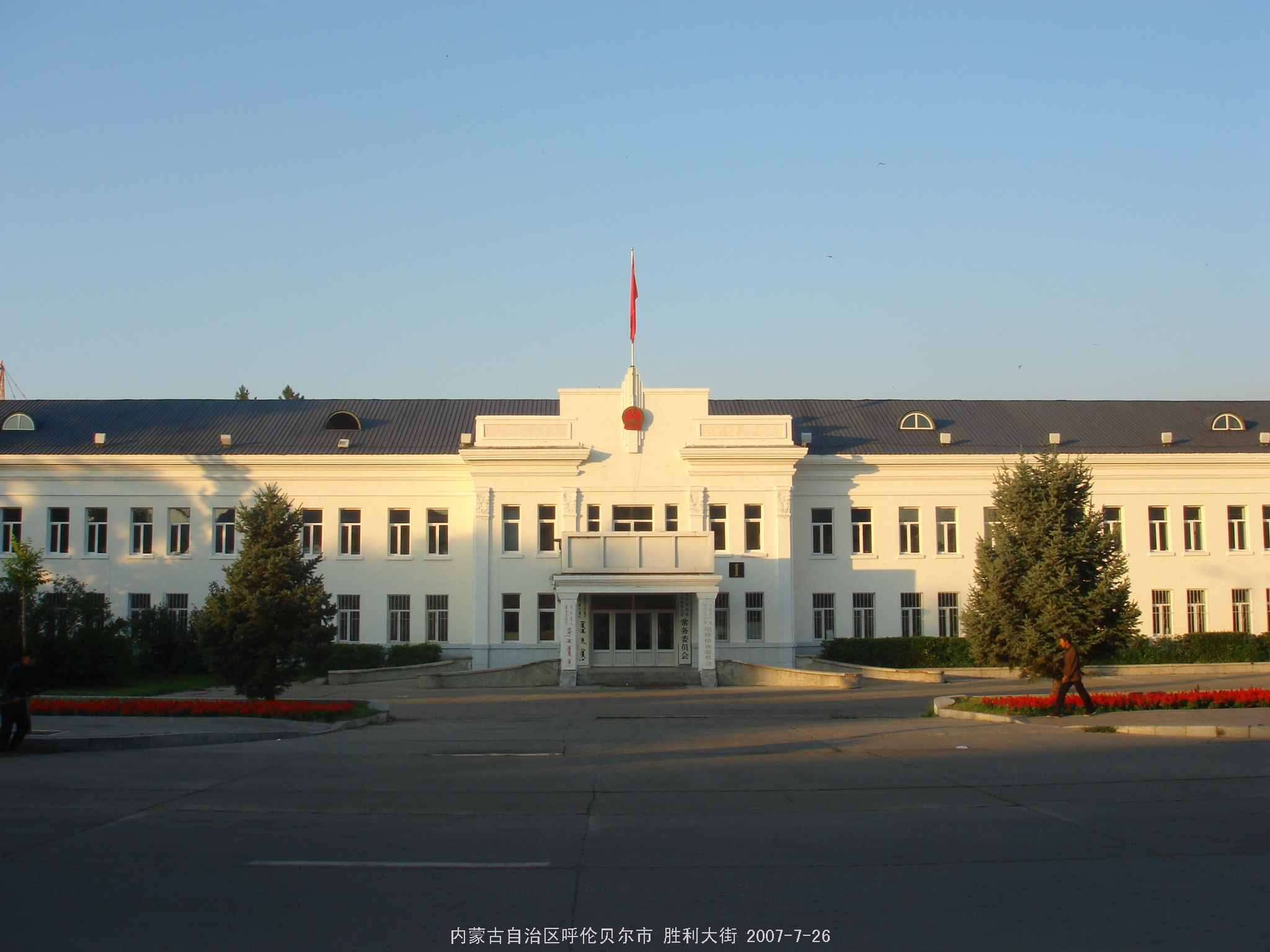 市人大、市纪委